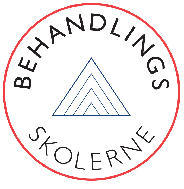 Behandlingsskolerne i København